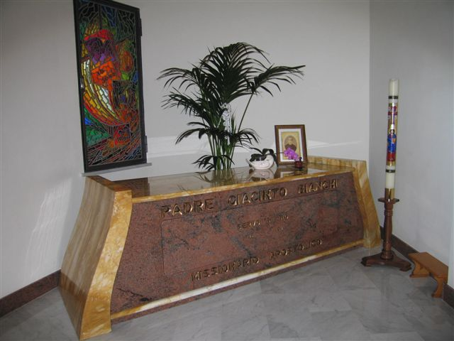 la sepoltura di p. Giacinto nella cappella della casa generalizia a Roma